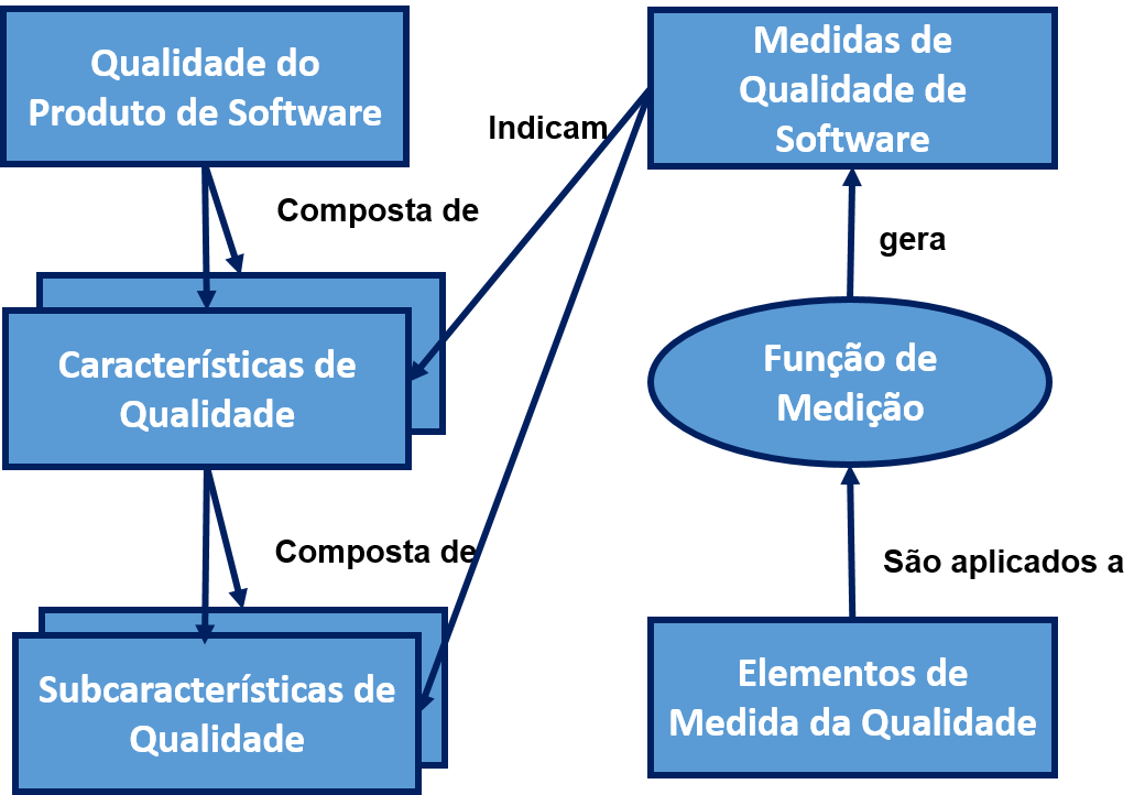 Modelo de Referência para a Medição de Qualidade De Produto de Software segundo a norma ISO/IEC 25020:2009